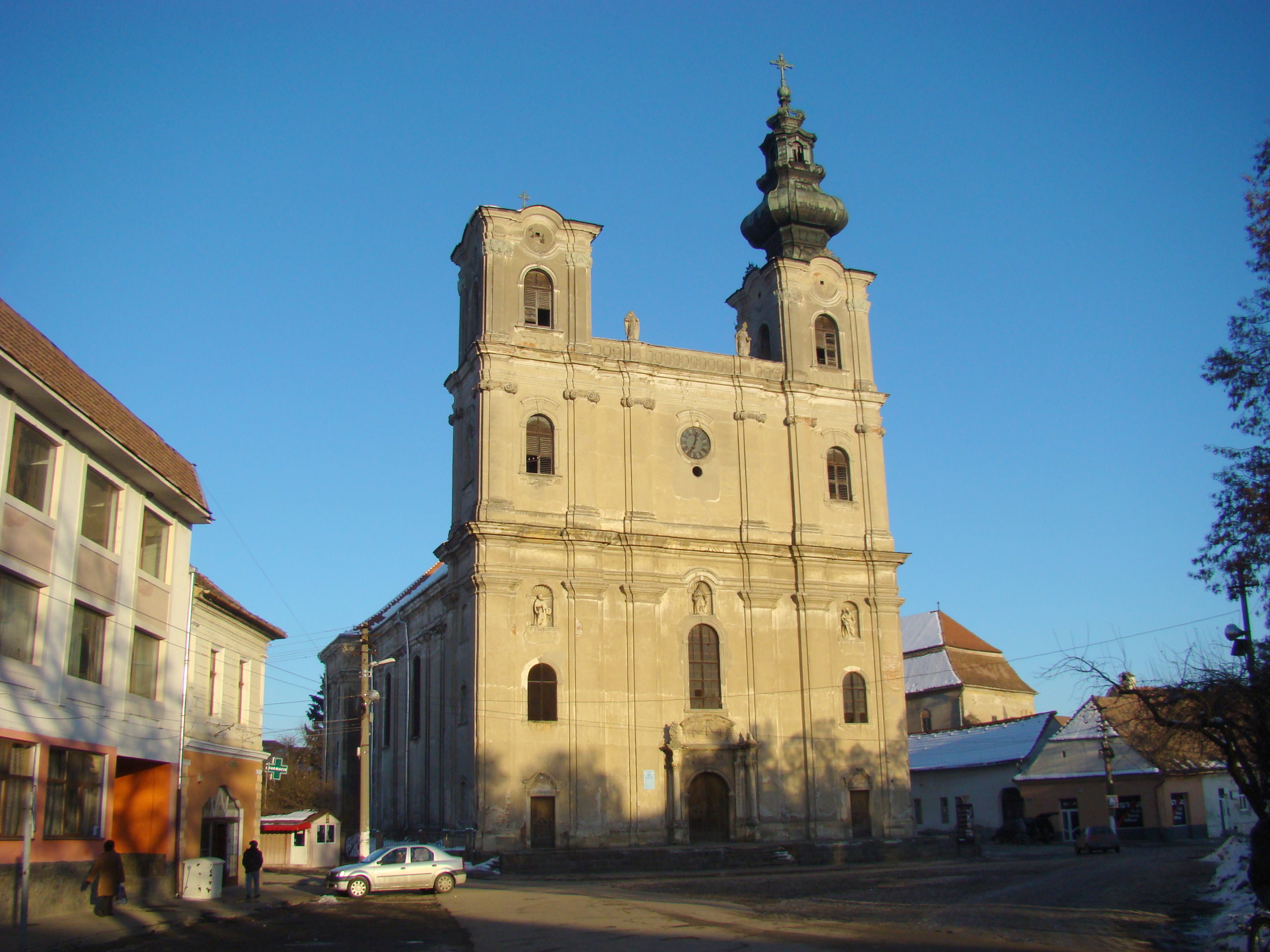 Biserica armeano-catolică "Sf. Elisabeta", oraș Dumbrăveni, județul Sibiu